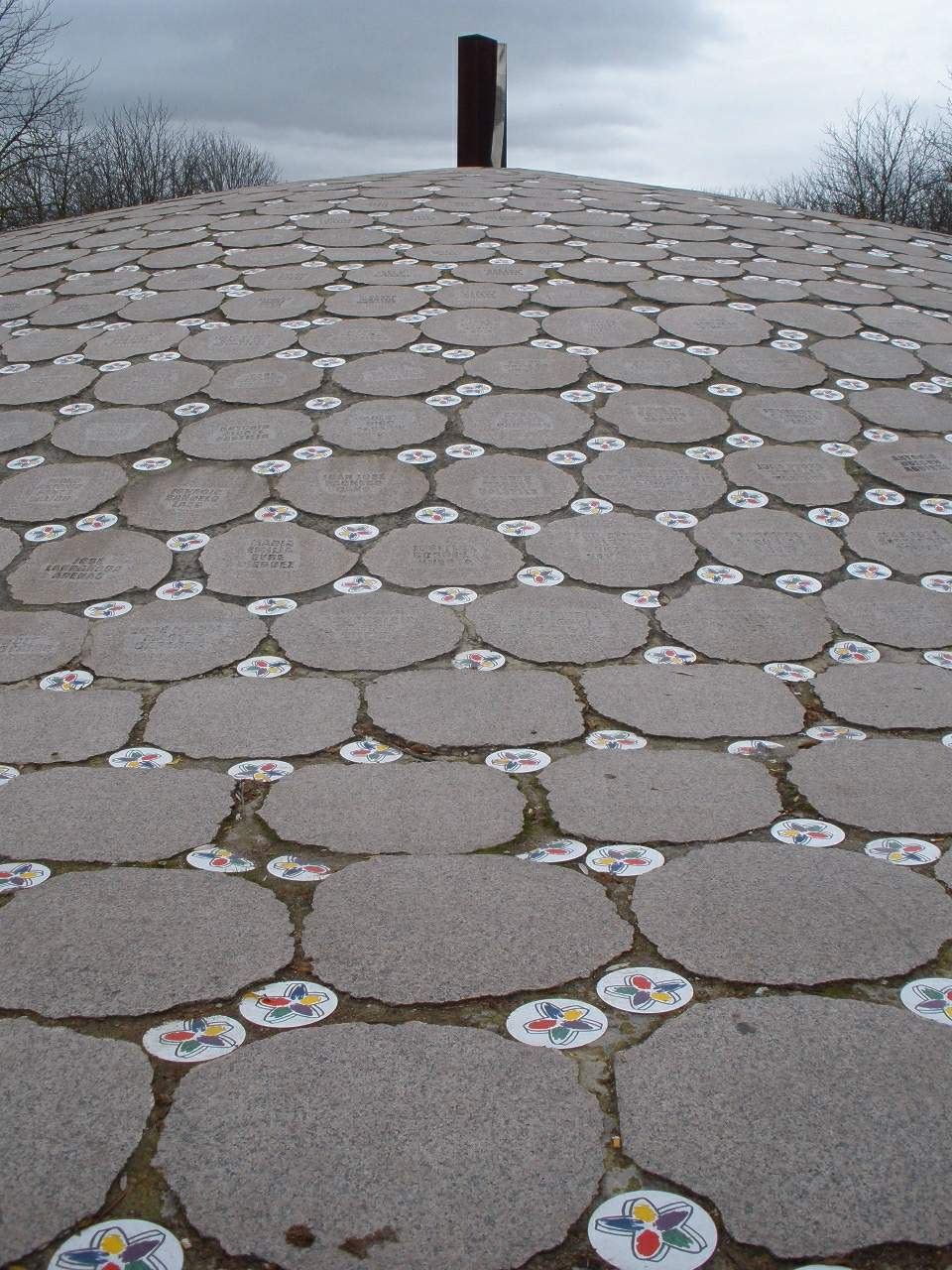 Monumento a las Victimas de ETA, en la calle Portal de Foronda (distrito de Lakua) de Vitoria-Gasteiz